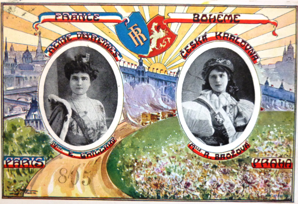 Carte postale tchèque commémorant la venue de la reine tchèque Ruzena Brazova à la Mi-Carême à Paris en 1910.